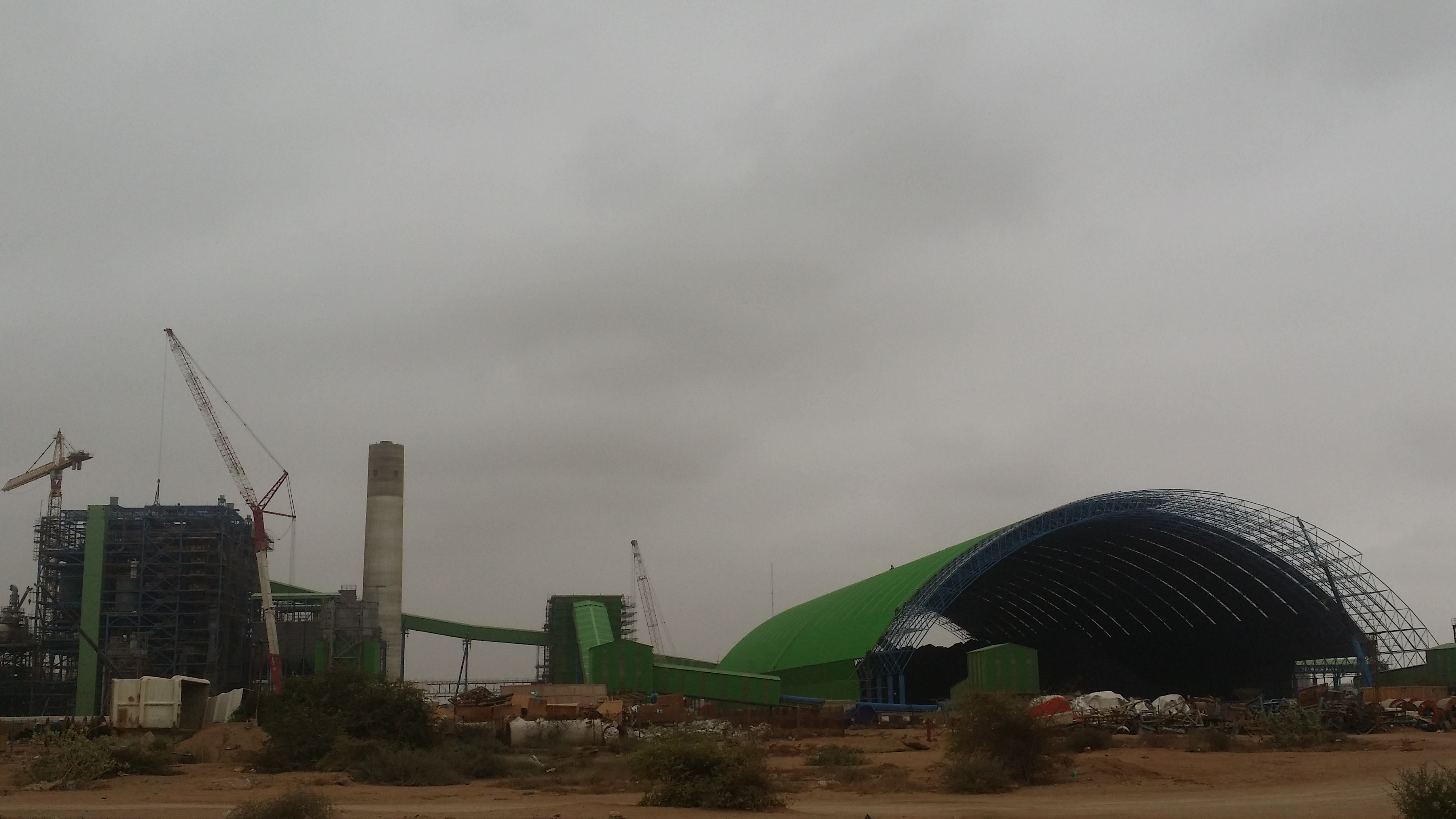 سنڌي: ڪوئلو پاور پلانٽ